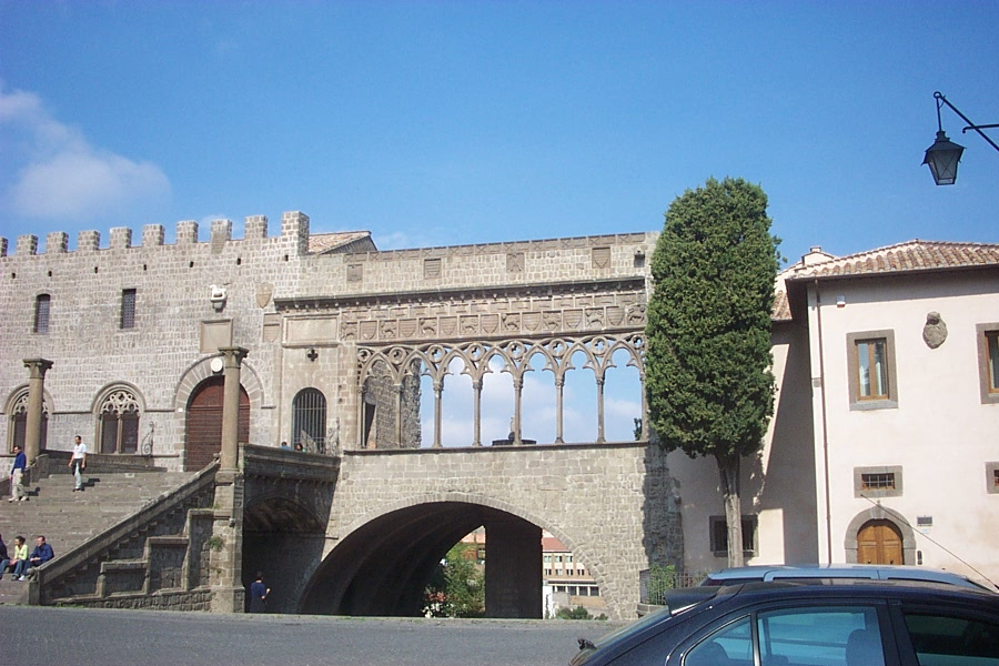 Viterbo, Palazzo Papale. Foto personale